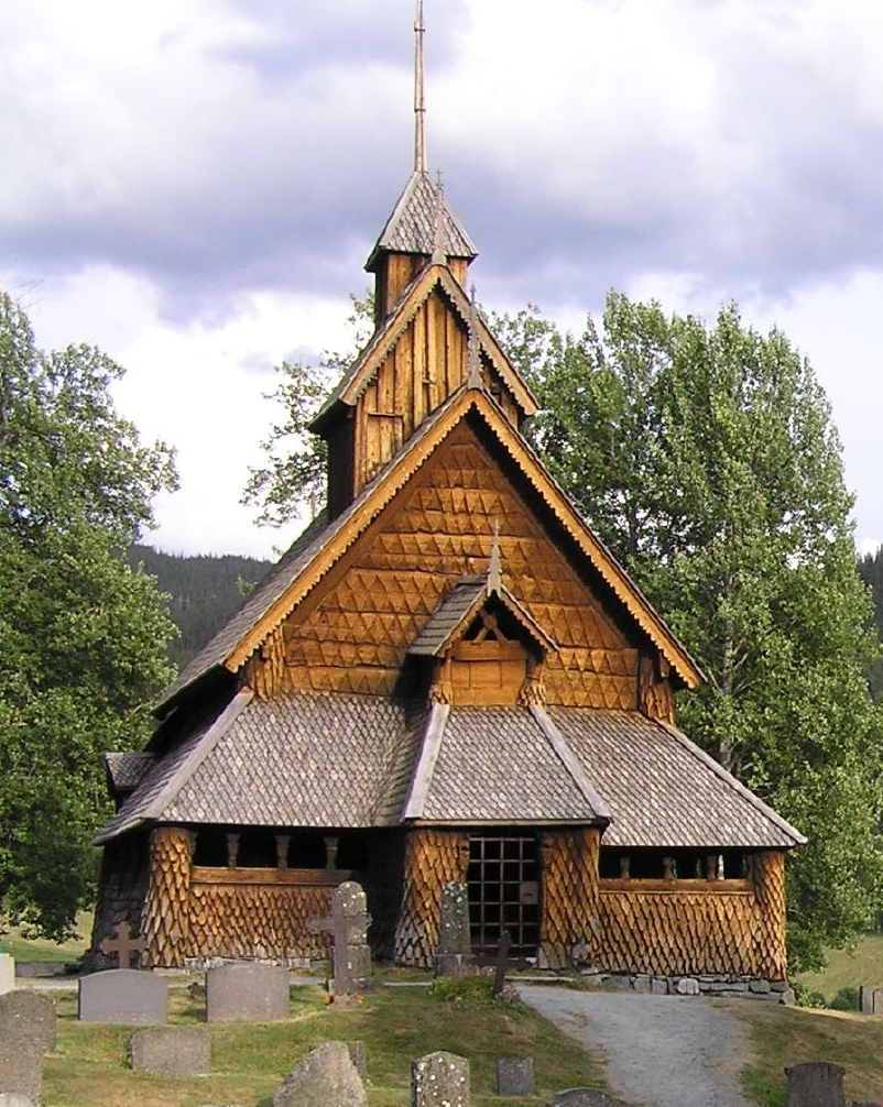 Eidsborg stavkyrkje